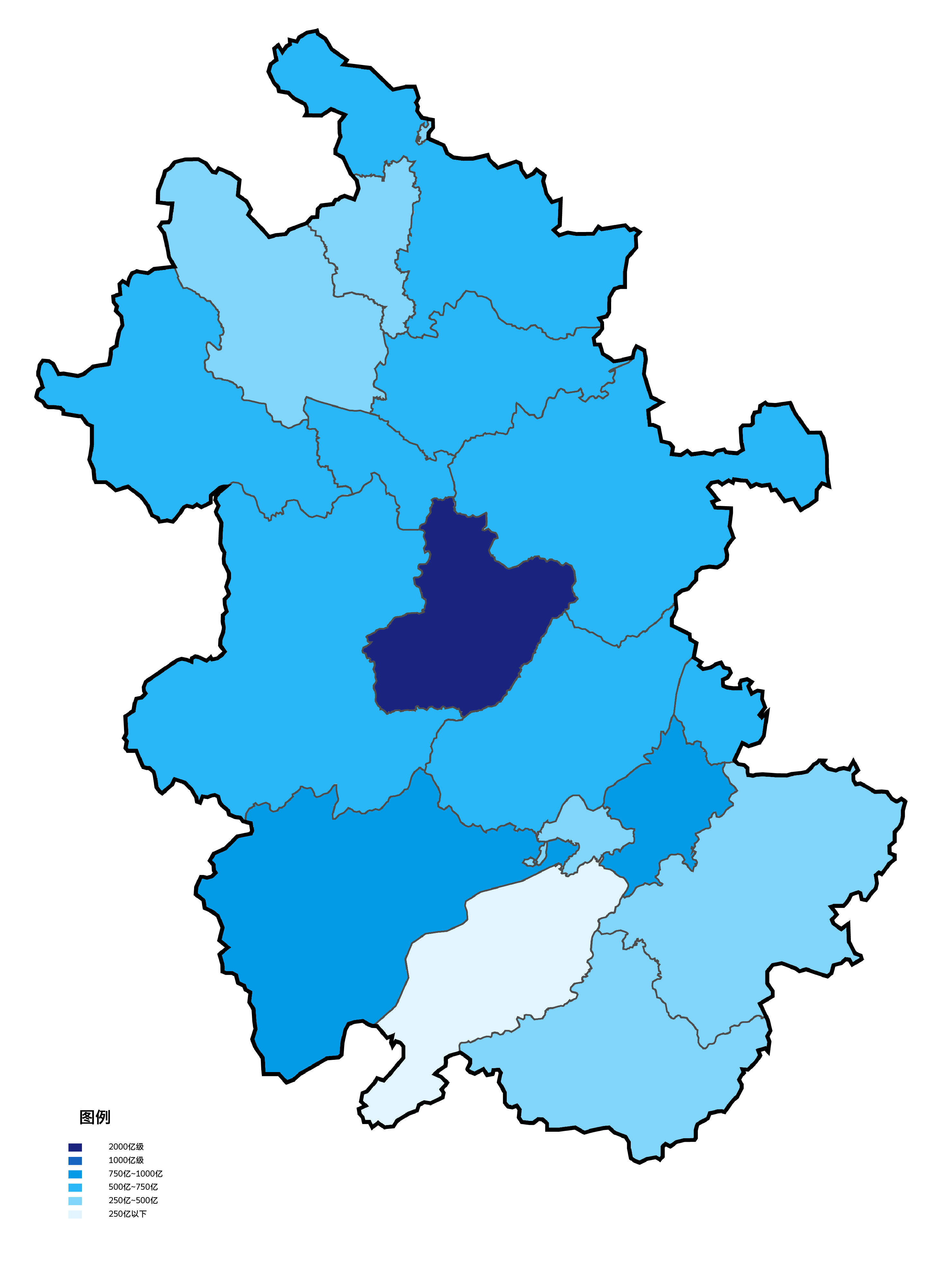 中文（中国大陆）: 安徽省各地级市根据2009年地区生产总值填色地图